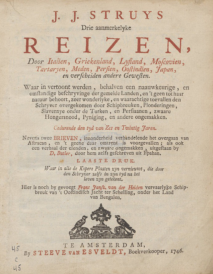 From Jan Janszoon Struys (1746): Drie aanmerkelyke reizen